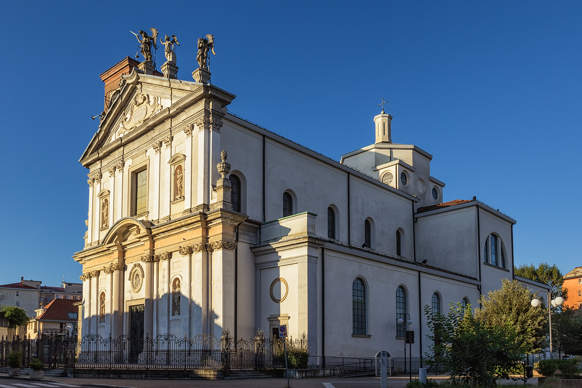 San Michele Arcangelo This is a photo of a monument which is part of cultural heritage of Italy.